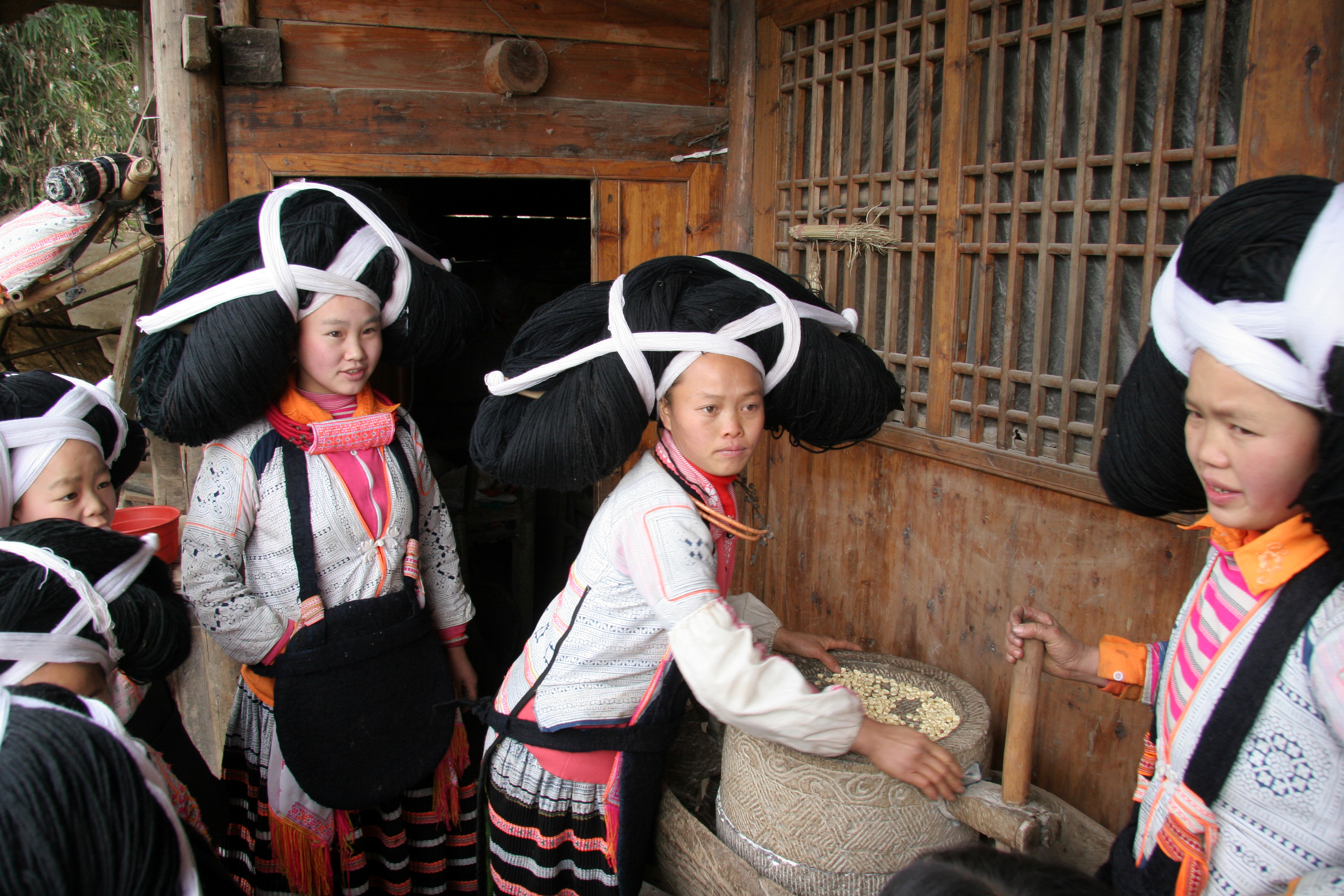 Chine Guizhou Suoga femmes Miao à corne boyant du mais